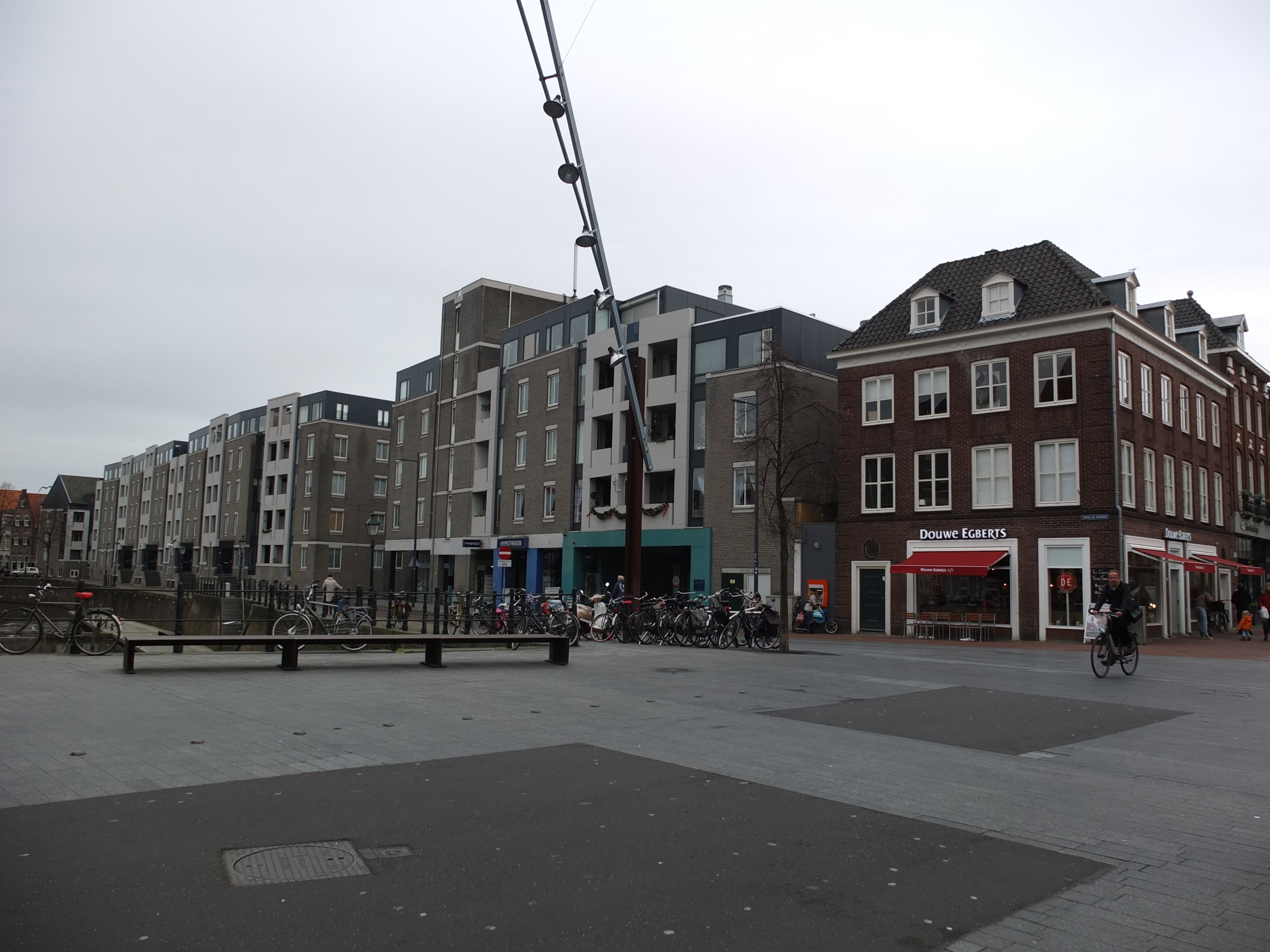 Smalle Haven 's-Hertogenbosch